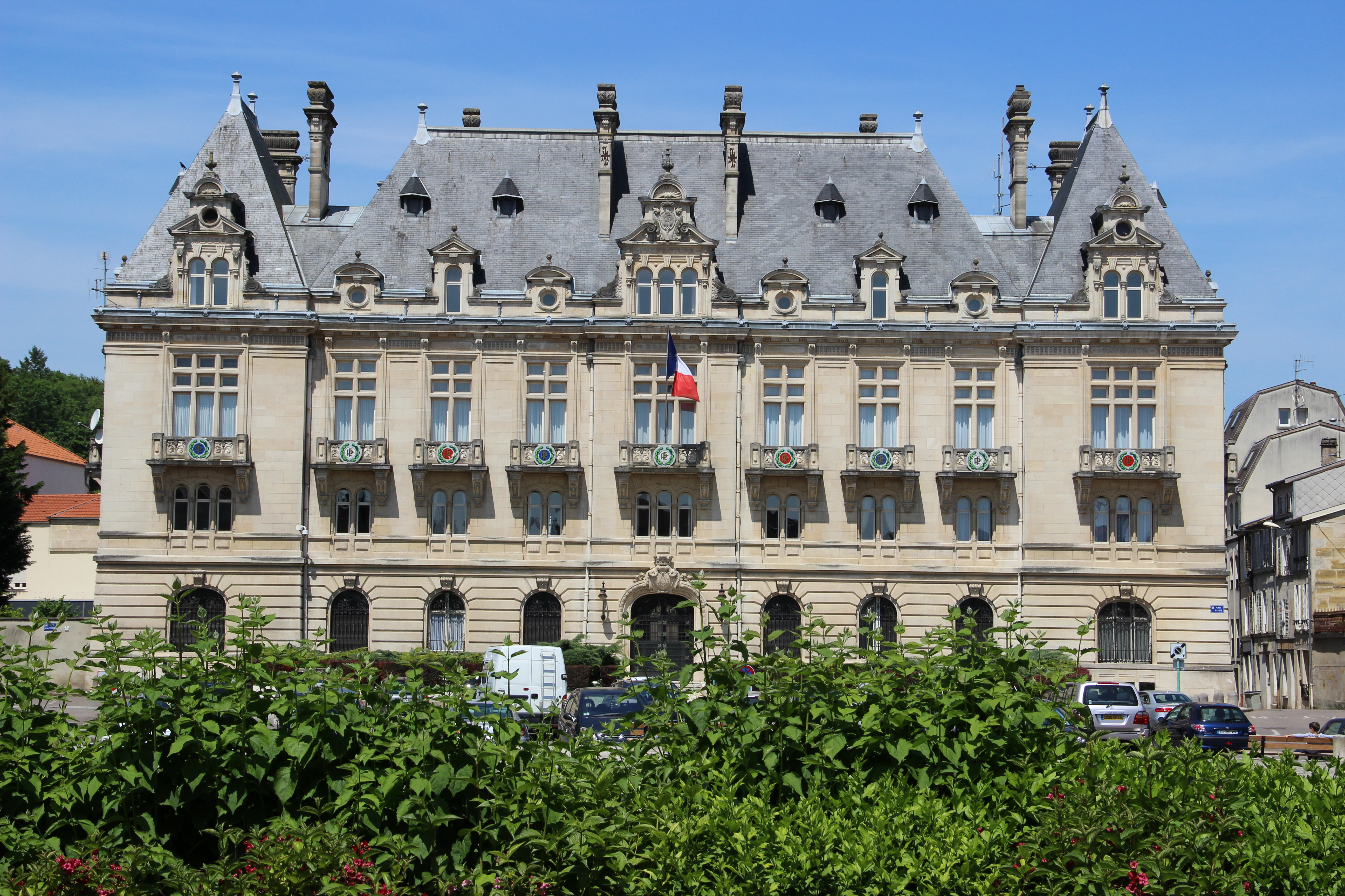 La préfecture de la Meuse, Place Reggio